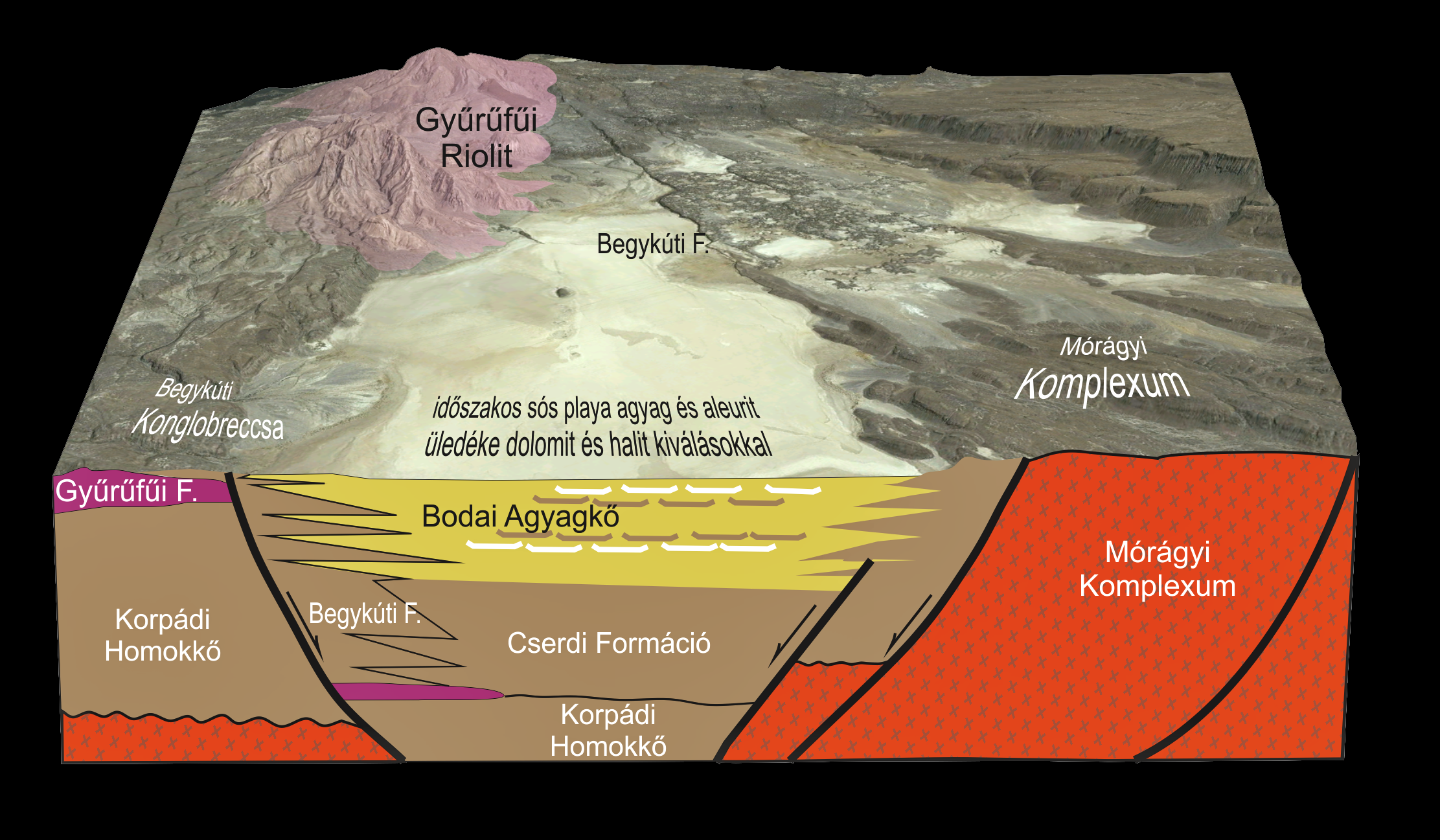 A Bodai Agyagkő Formáció a perm időszak száraz periódusában keletkezett egy sós playa tó medencéjében. A gyakori kiszáradás ciklusos rétegsort eredményezett.